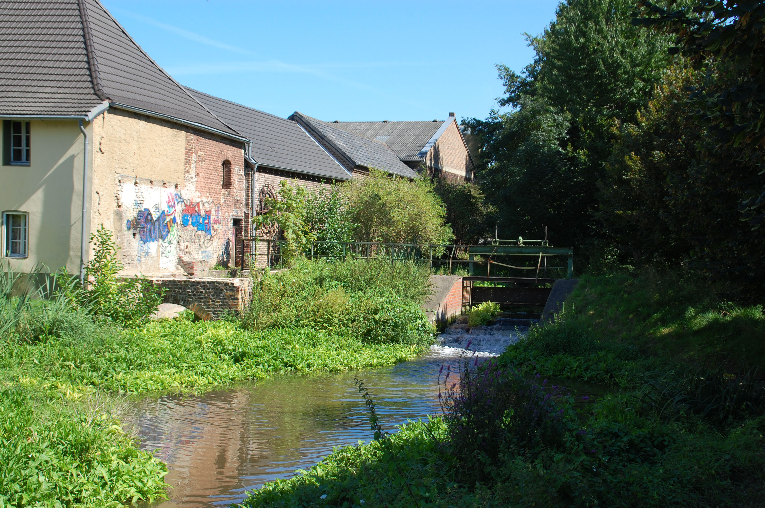 Pliesmühle (ehemalige Schleifmühle) in Quadrath-Ichendorf, Bergheim